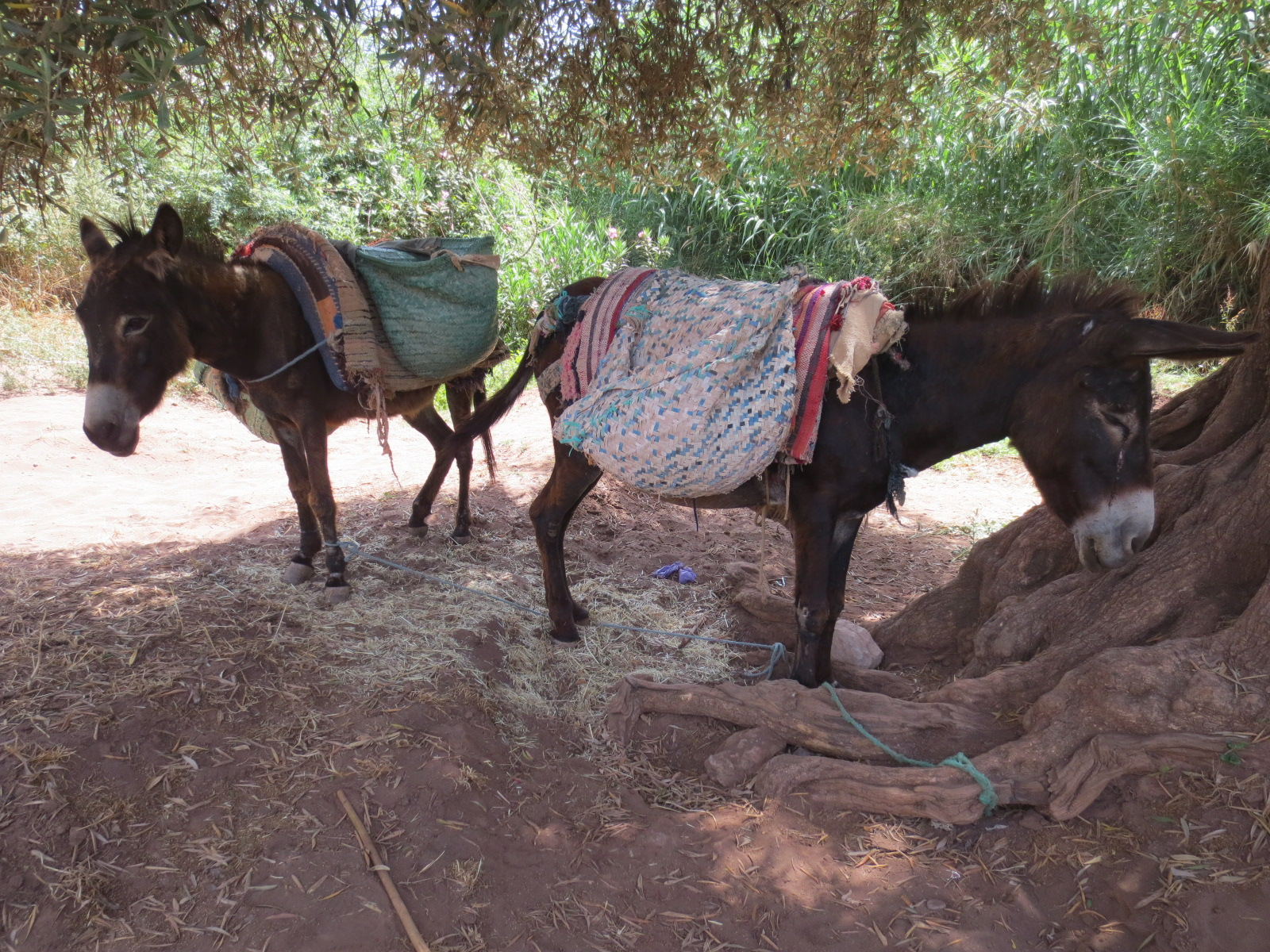 Ouzoud Falls